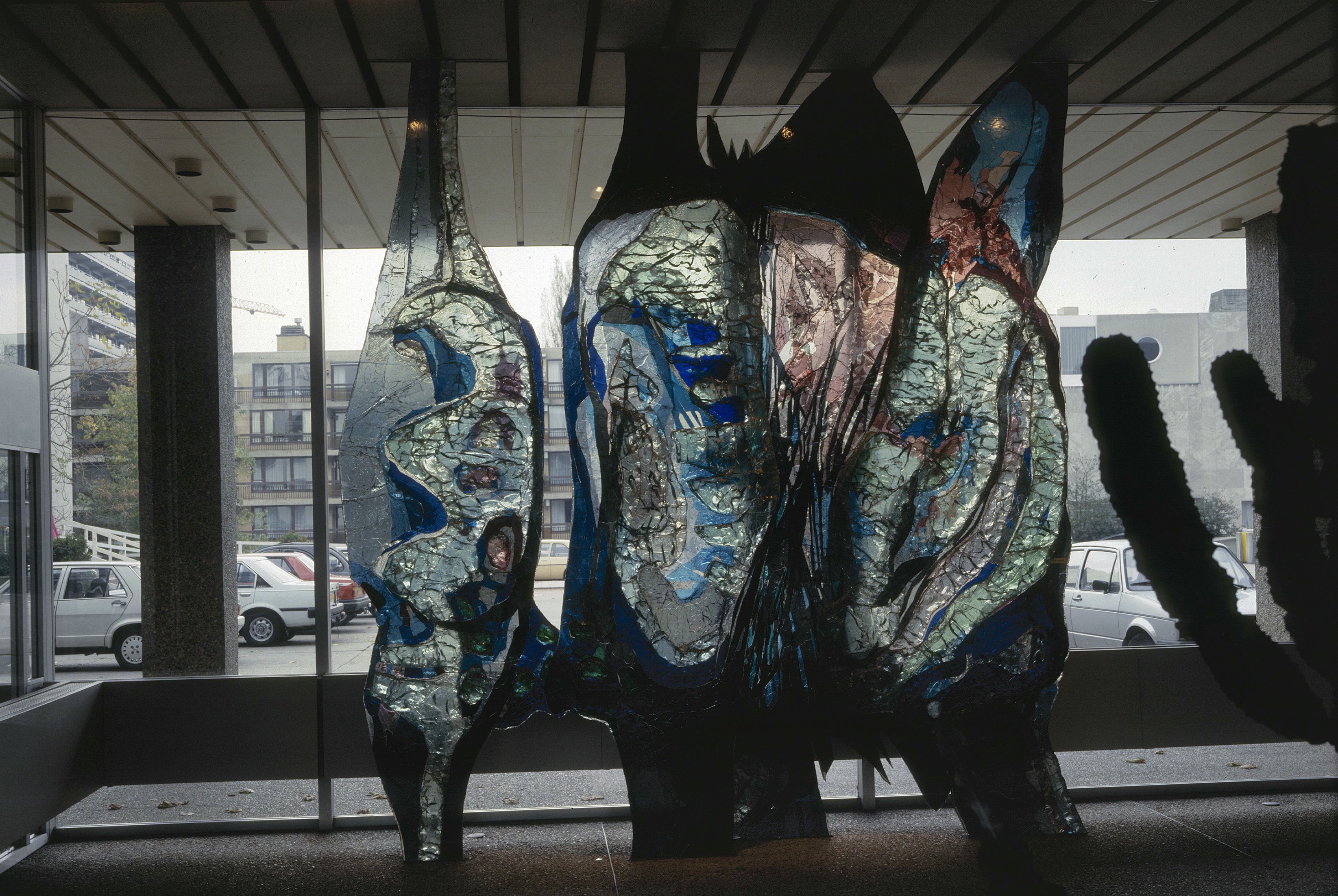 Paleis-Raadhuis: Interieur, aanzicht glassculptuur van Joop van den Broek (opmerking: Gefotografeerd voor Glas in lood in Nederland 1817-1968)